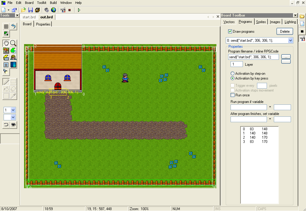 Editor do RPG Toolkit, editando uma cena